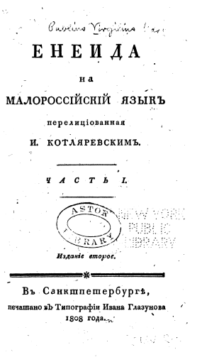 Енеїда Котляревського 2 видання.